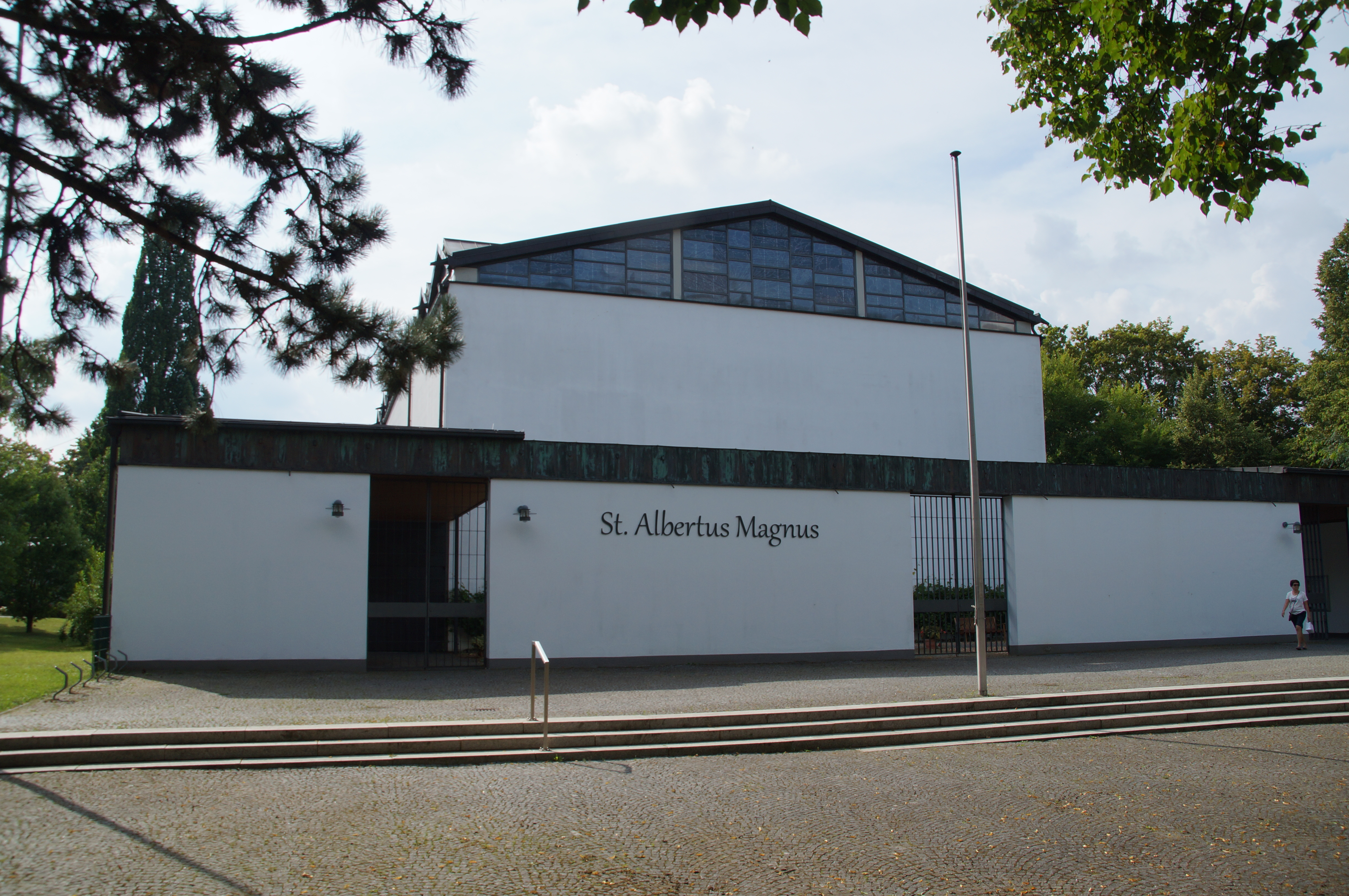 Kath. St. Albertus Magnus Kirche in der Schwabenstraße, Regensburg